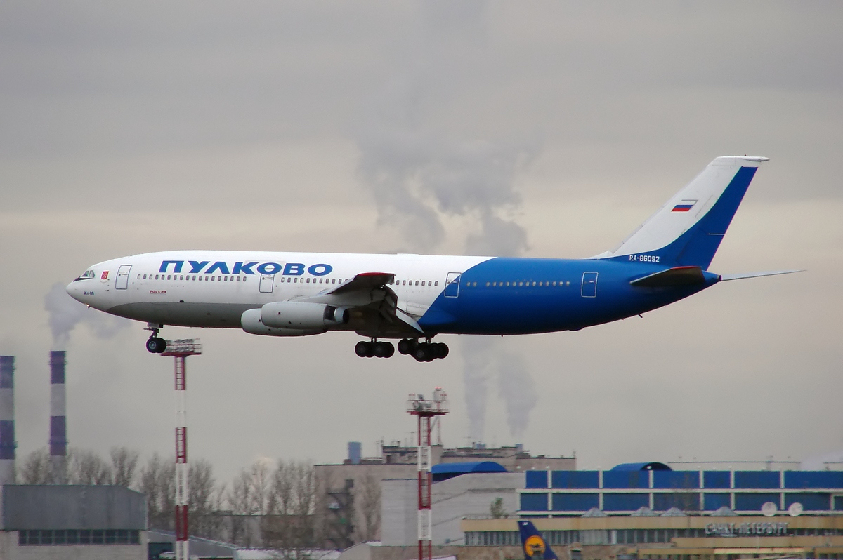 Rossiya Ilyushin Il-86